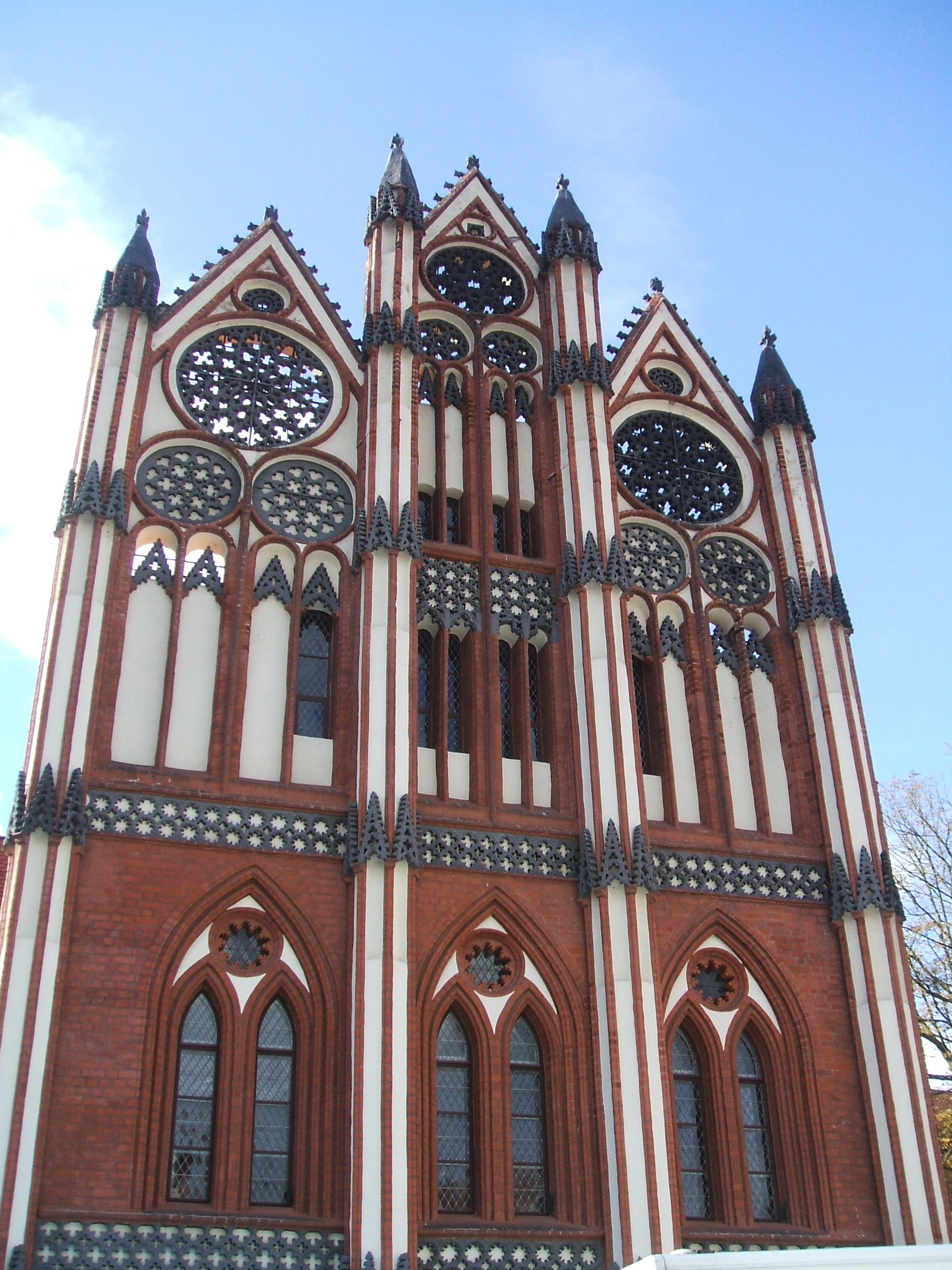 Tangermünde,_Historisches Rathaus